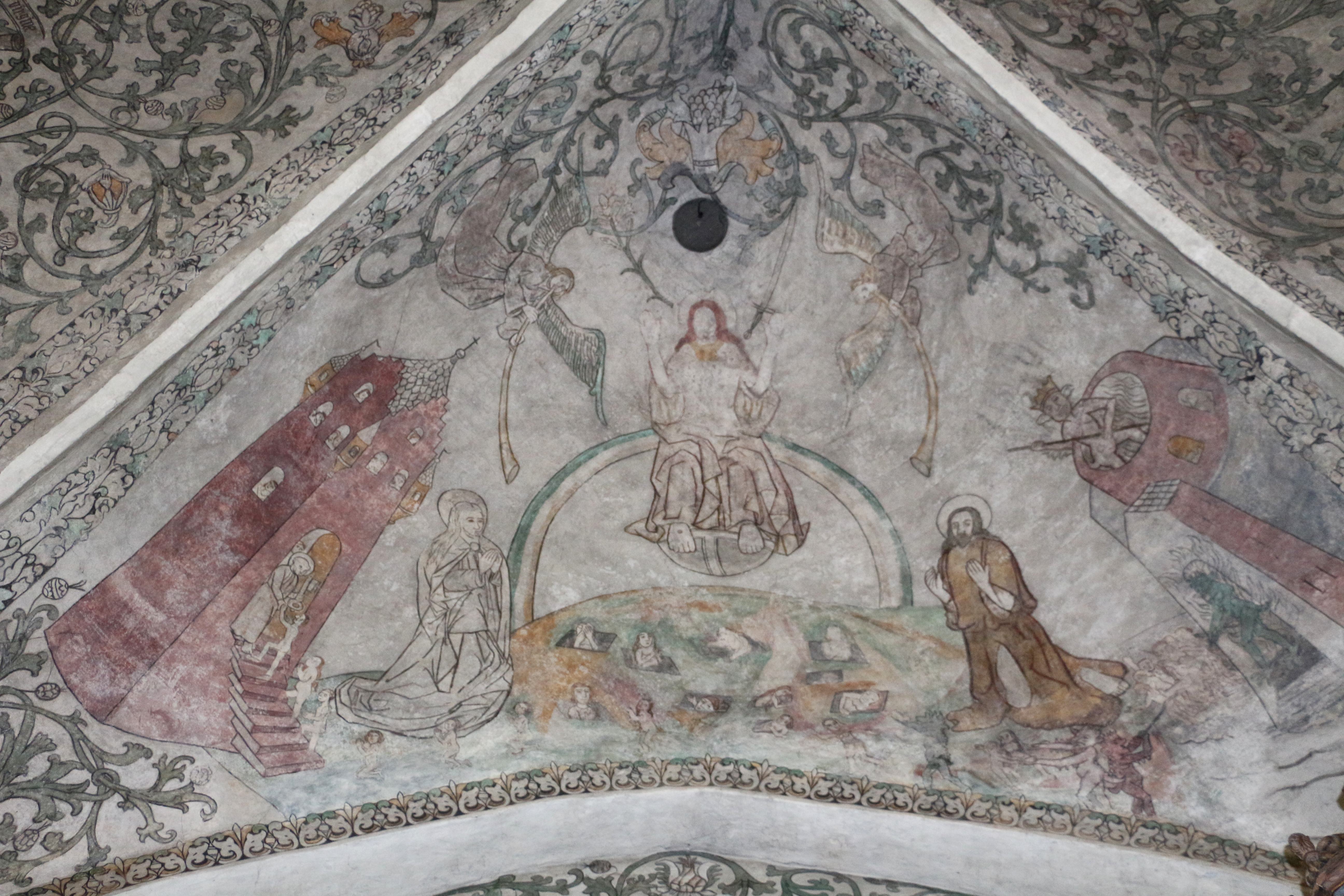 Darstellung des Jüngsten Gerichts im Gewölbe der Johanniskirche (Flensburg)